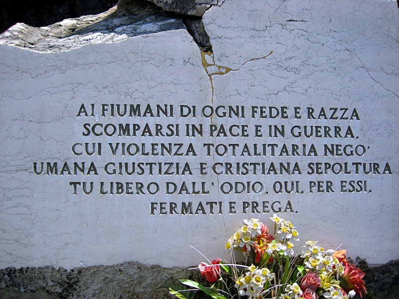 Spomen ploča uz Votivni hram na Kozali u Rijeci